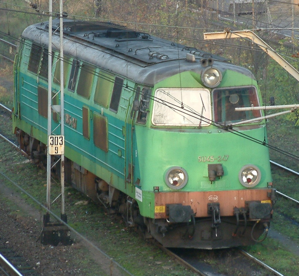 SU45-247 in Poznań